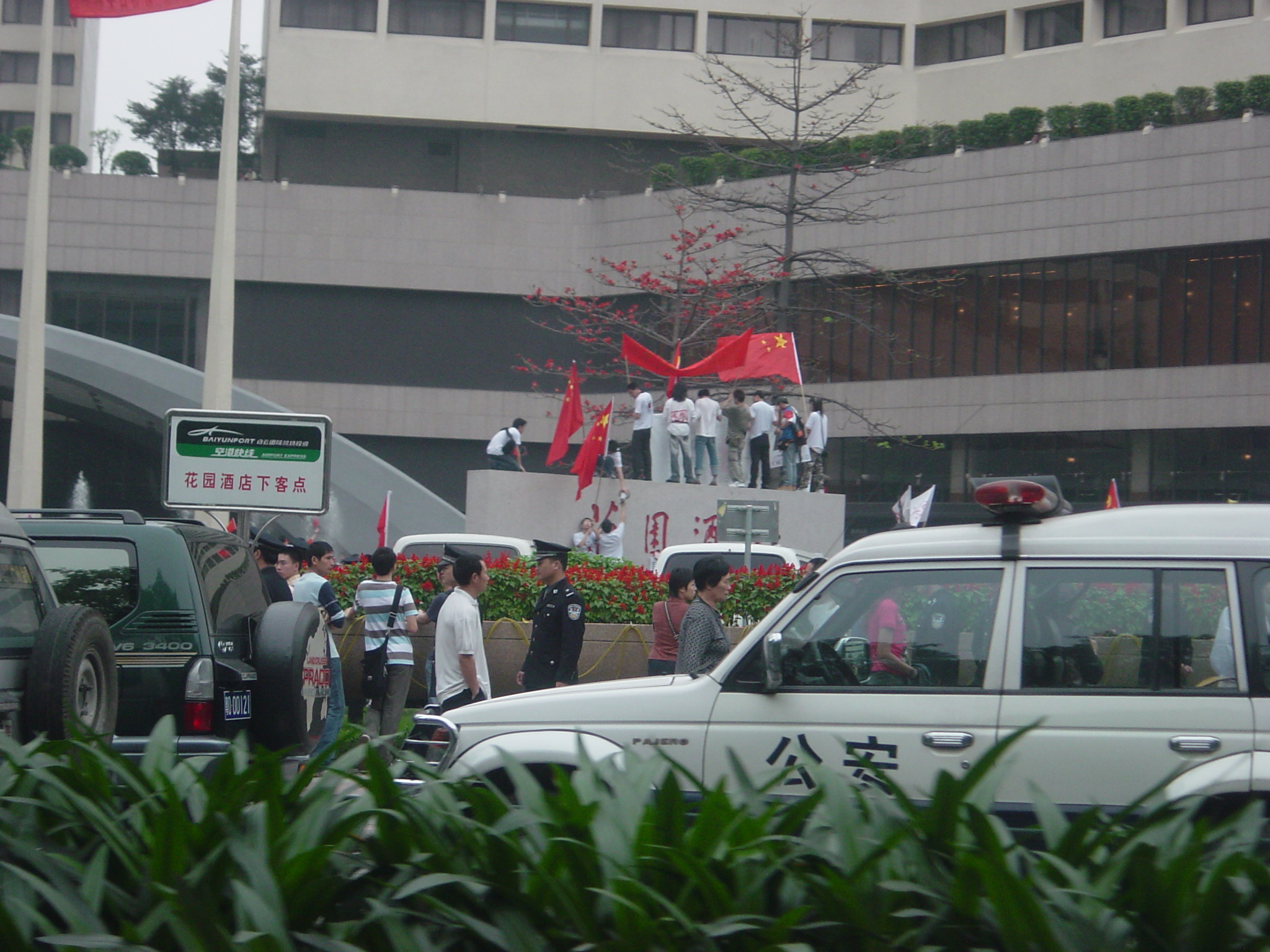 2005年广州反日示威活动